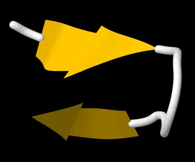 世界最小たんぱく質「シニョリン」の立体構造(Jmol)